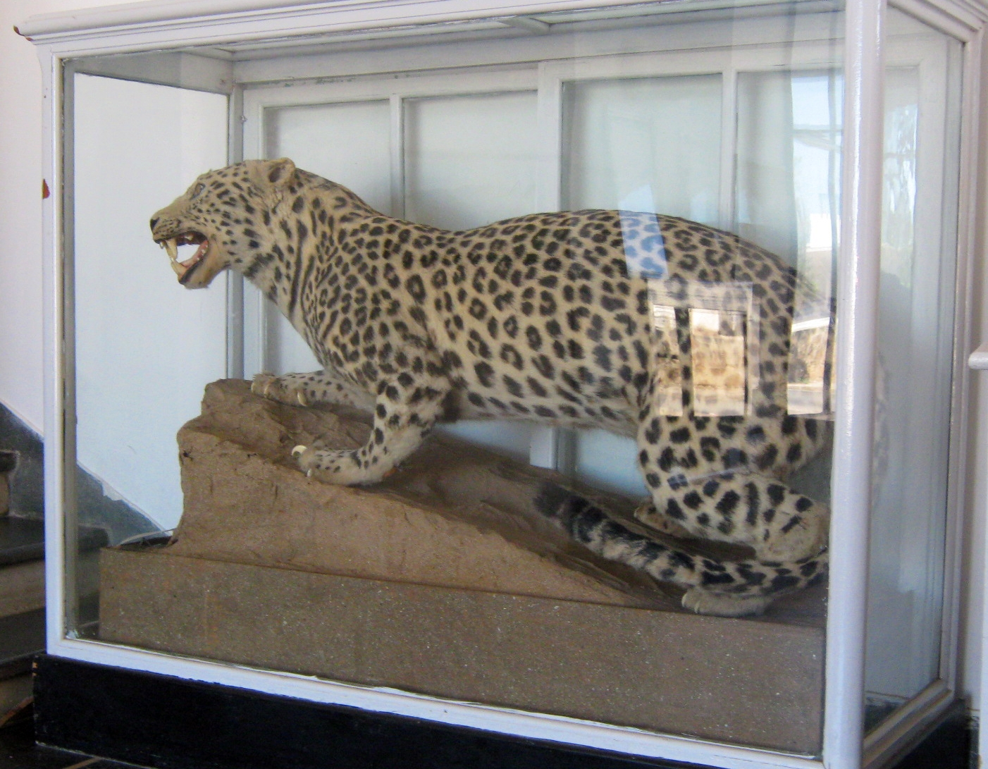 Panthère au Muséum national d'histoire naturelle du Maroc (Institut scientifique de Rabat, université Mohammed V).